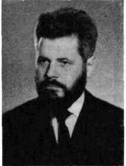 France Križanič